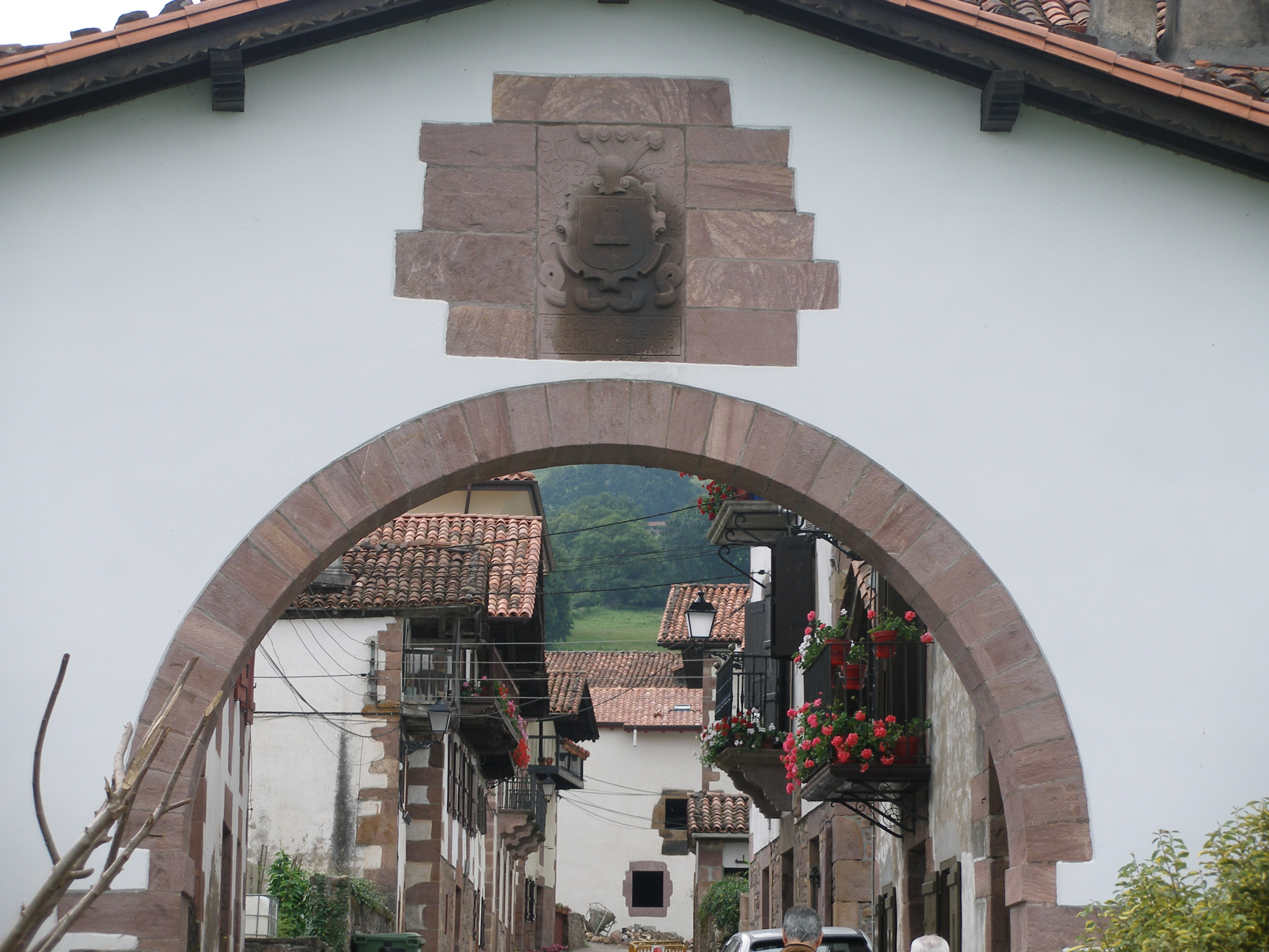 Amaiur (Navarra)